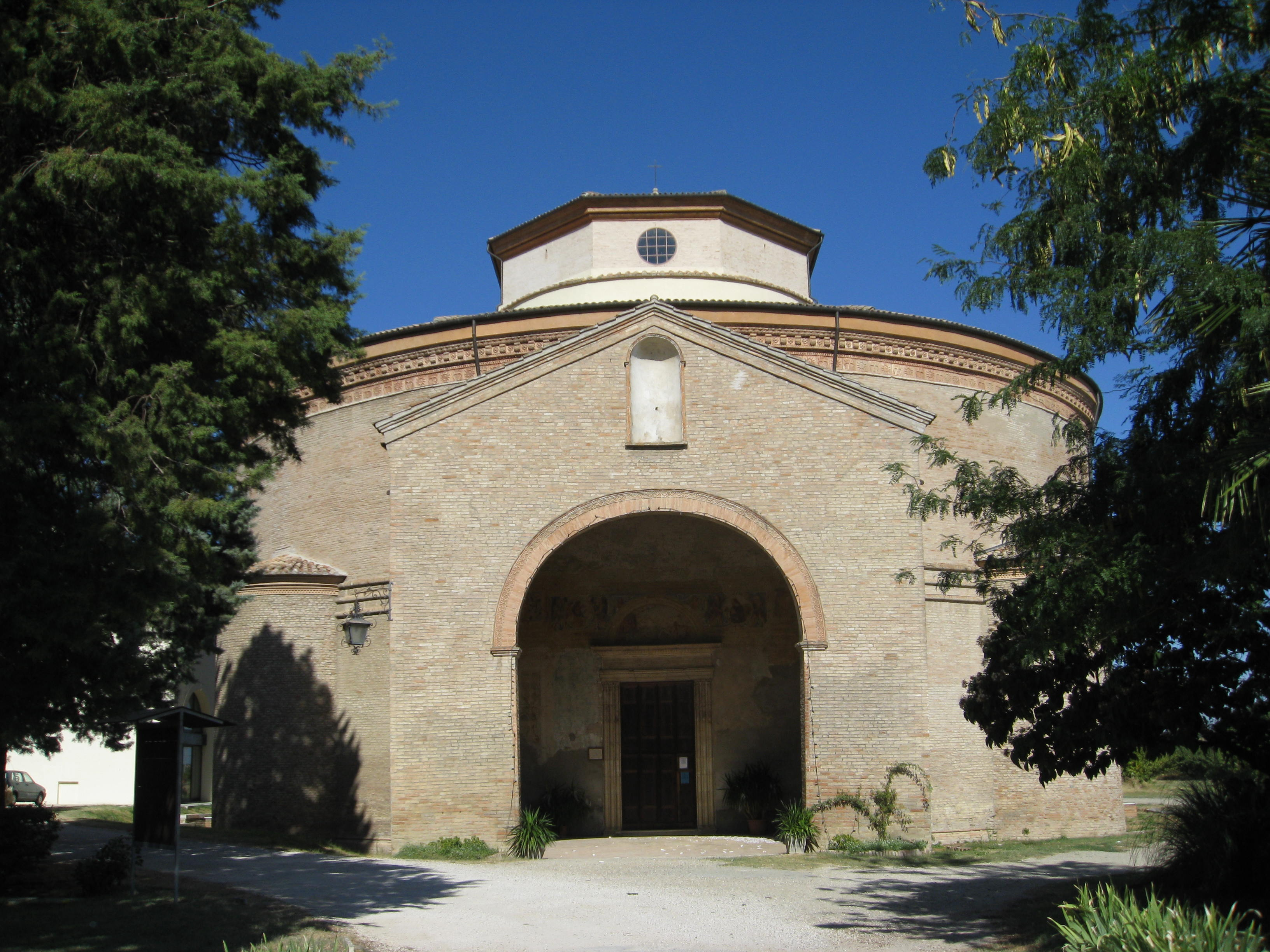 Perkele, Facciata del Santuario di Santa Maria delle Grazie di Fornò, foto propria